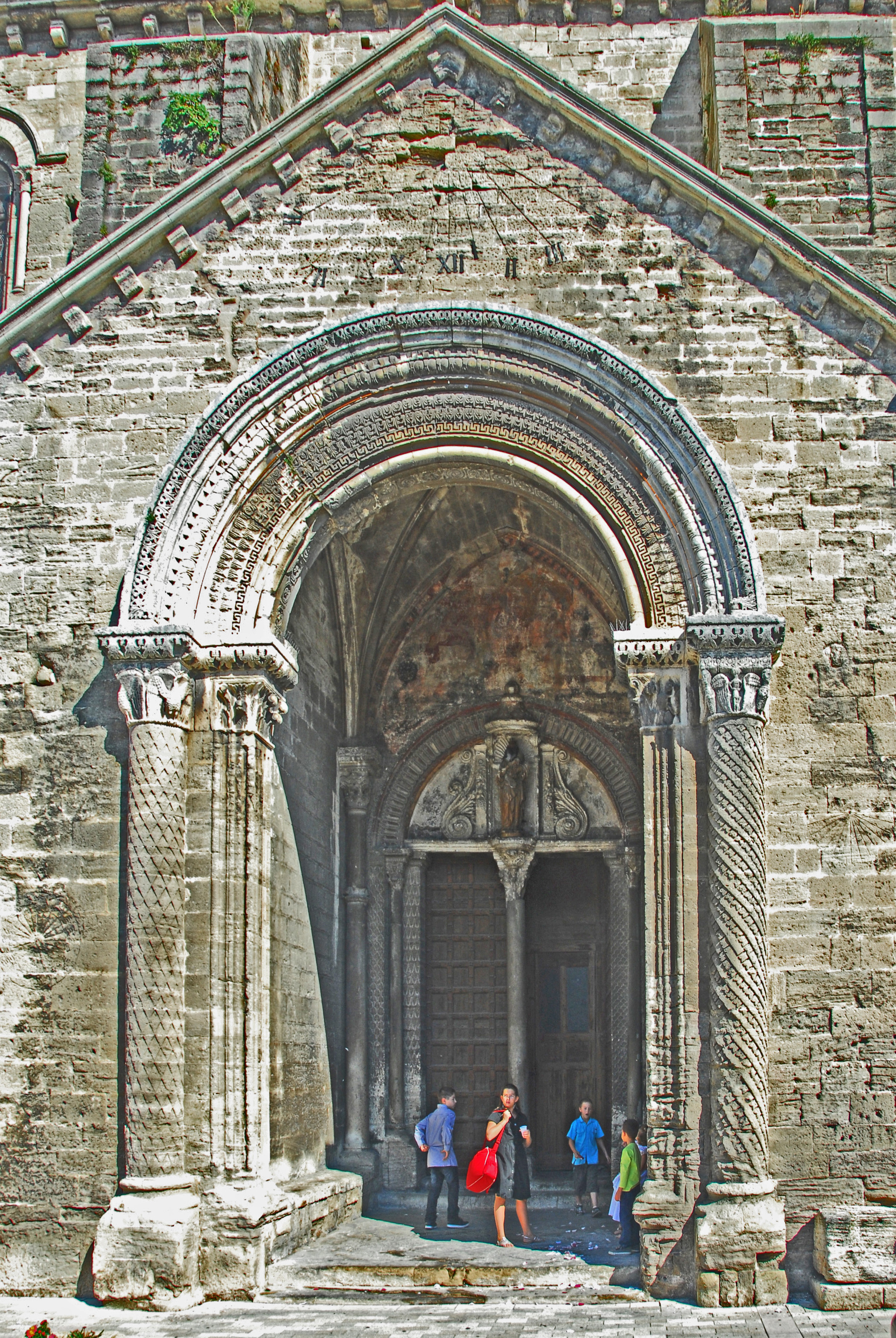 ND-du-Lac du Le Thor, Vorhalle